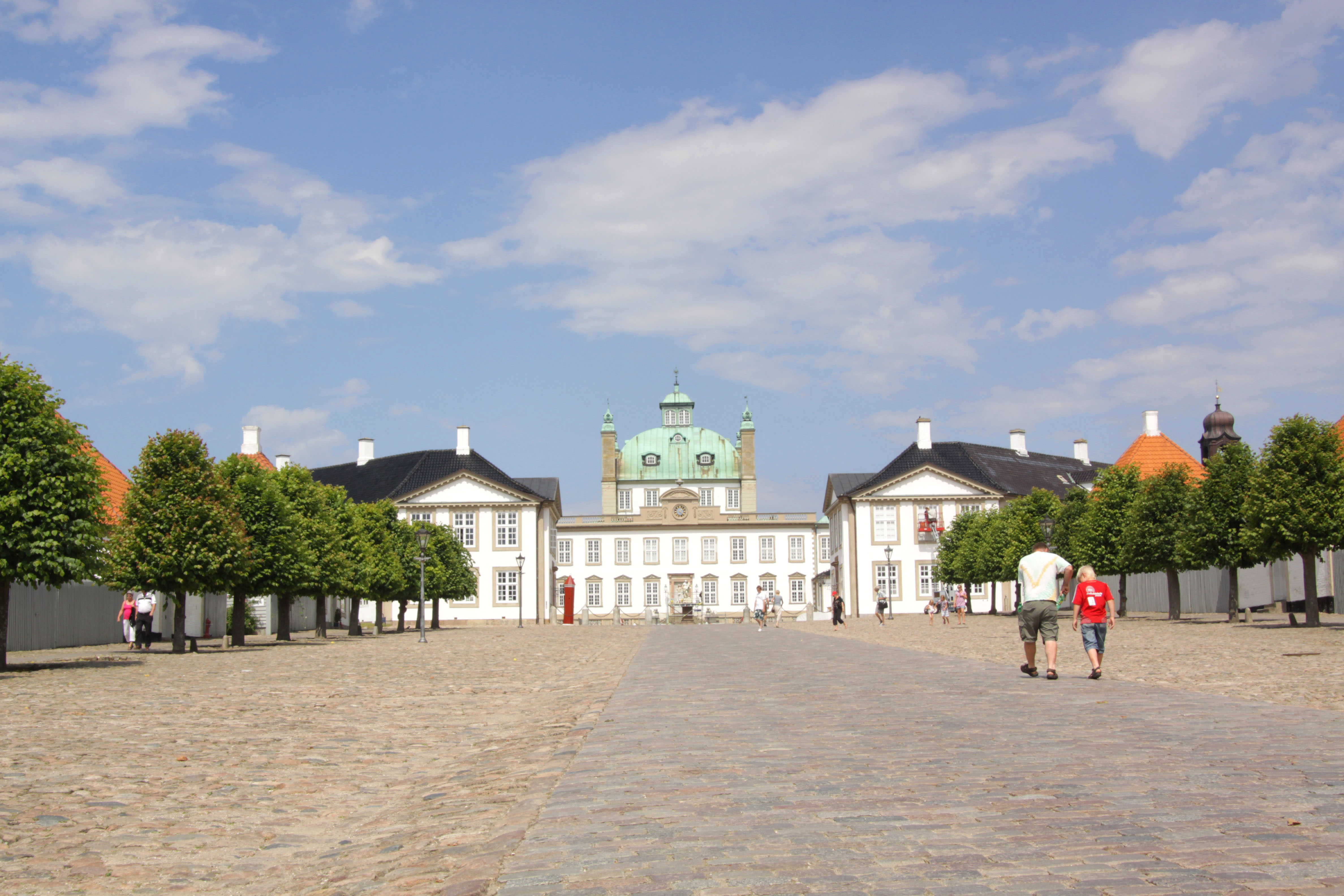 Fredensborg. Slottet in Fredensborg, Denmark